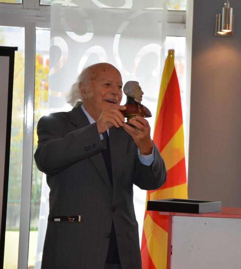 Јован Стрезовски со наградата Державин